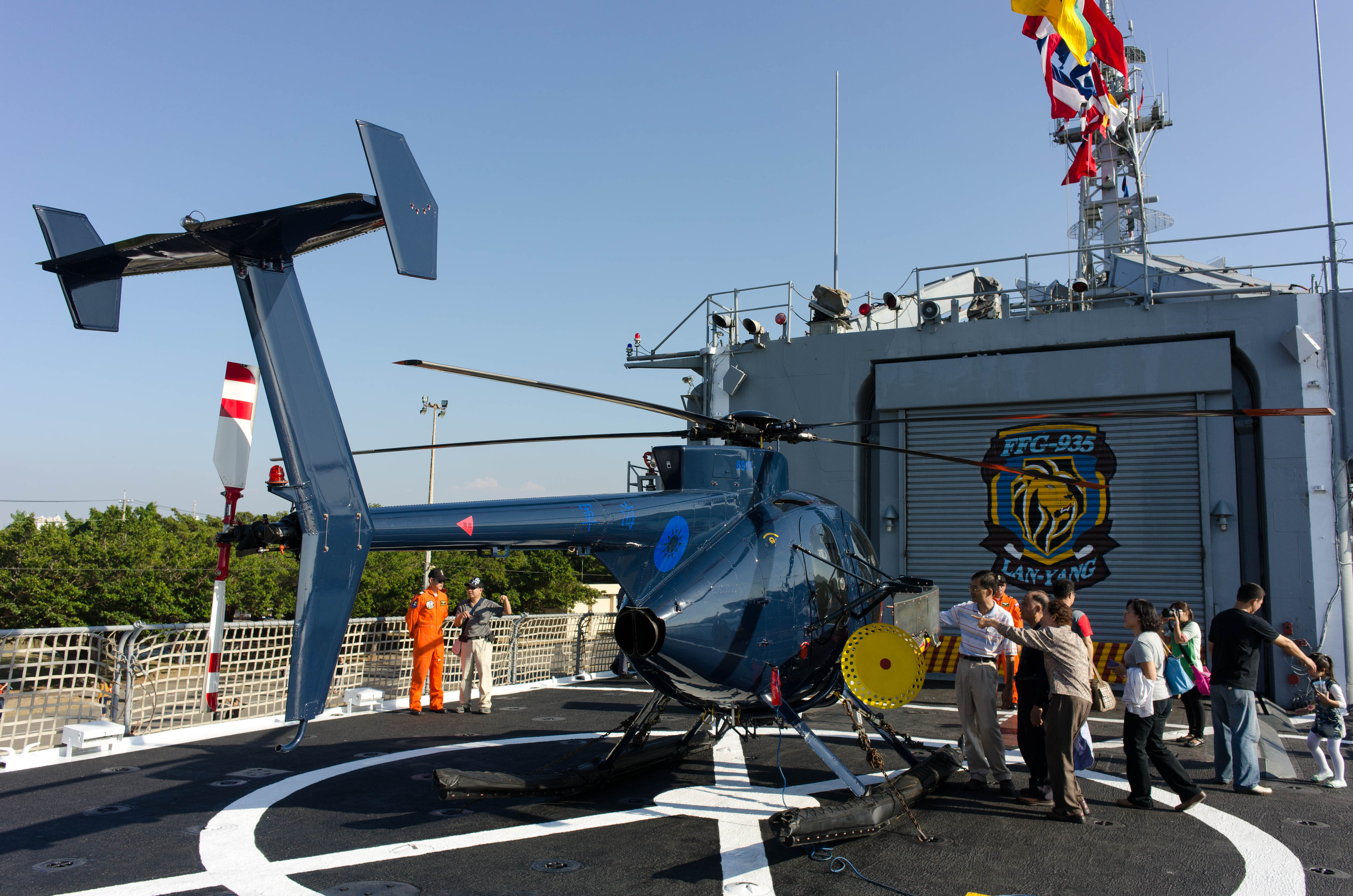 巡防艦蘭陽（FFG-935）艦尾直升機甲板上搭載的休斯500直升機6910右後方，攝於2014年左營軍港營區開放活動。